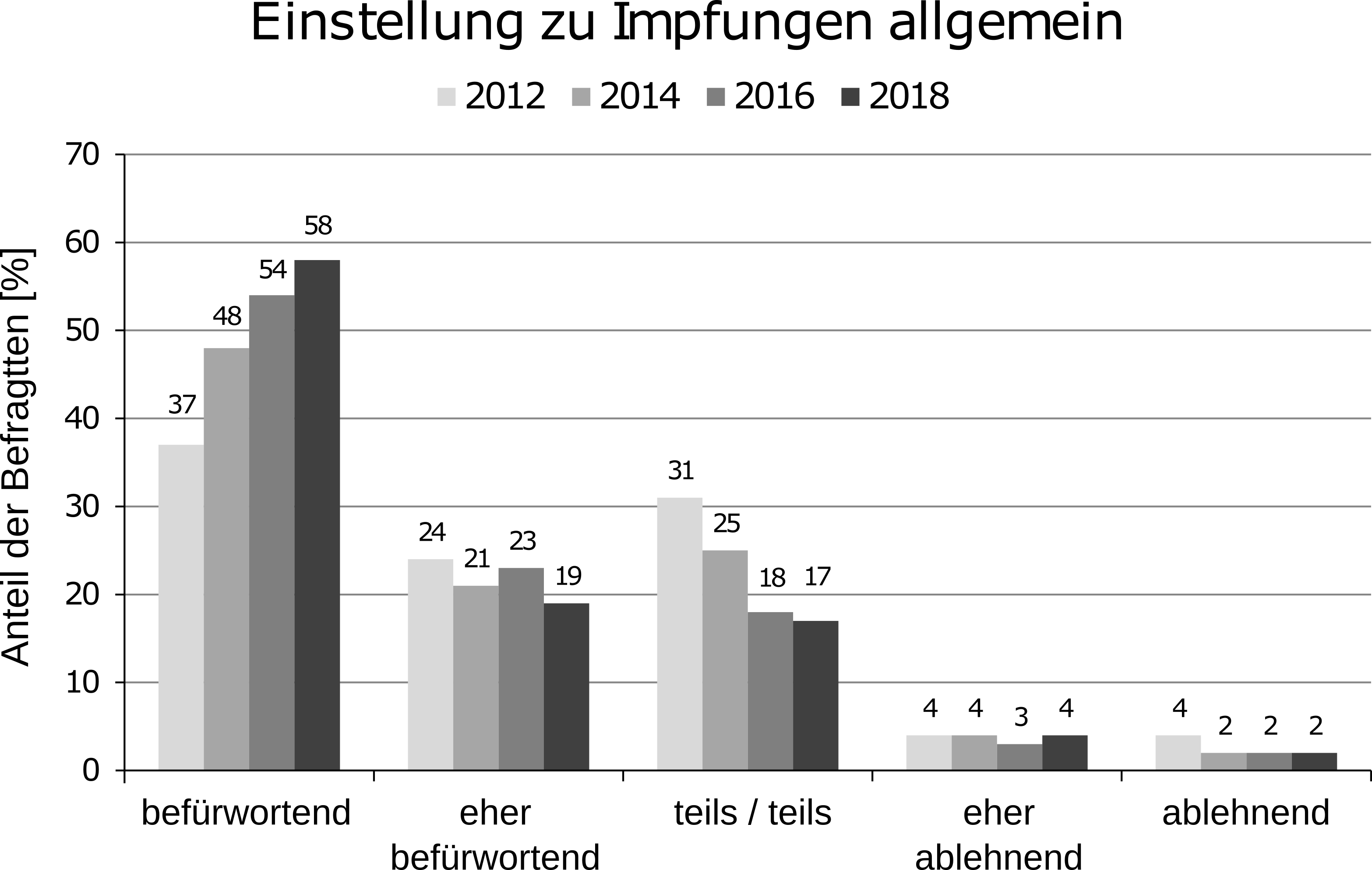 Einstellung zu Impfungen allgemein - Zeitvergleich von 2012 bis 2018 (Befragung durch das BZgA); Quelle: (S. 32); bzw.